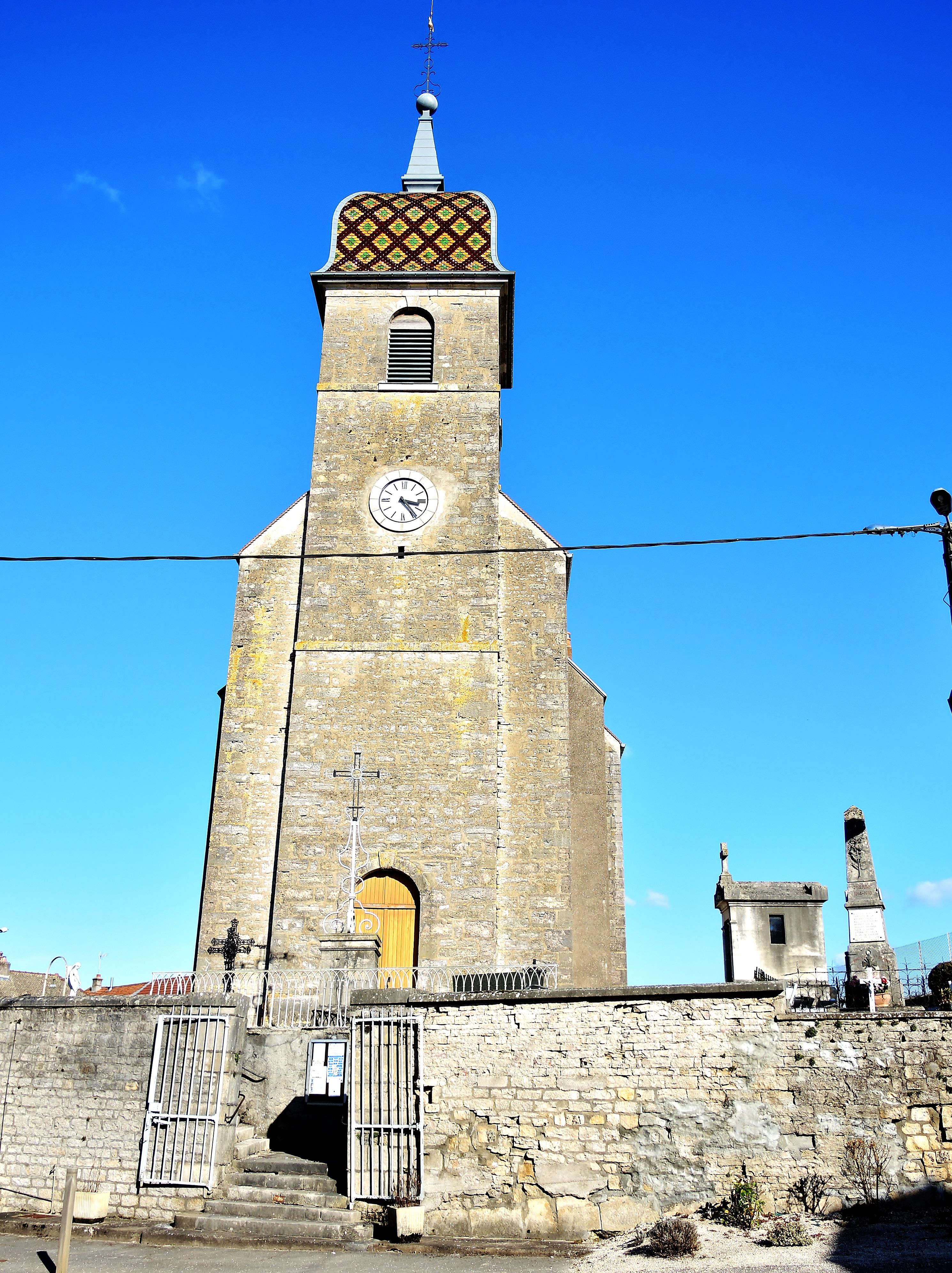 Façade de l'église de Vy-le-Ferroux.Département de Haute-Saône.